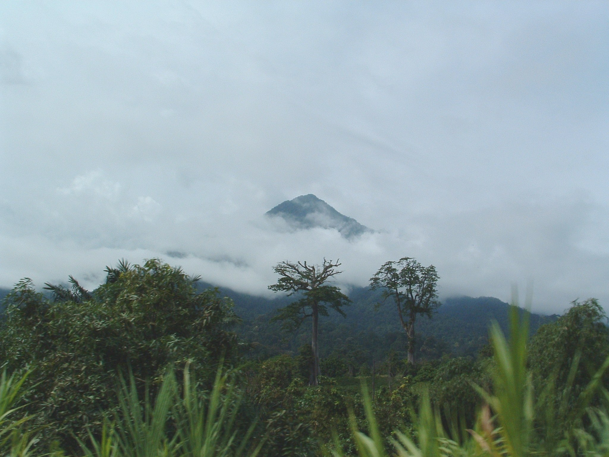 Vue du Mont-Cameroun à partir de la route de Limbe